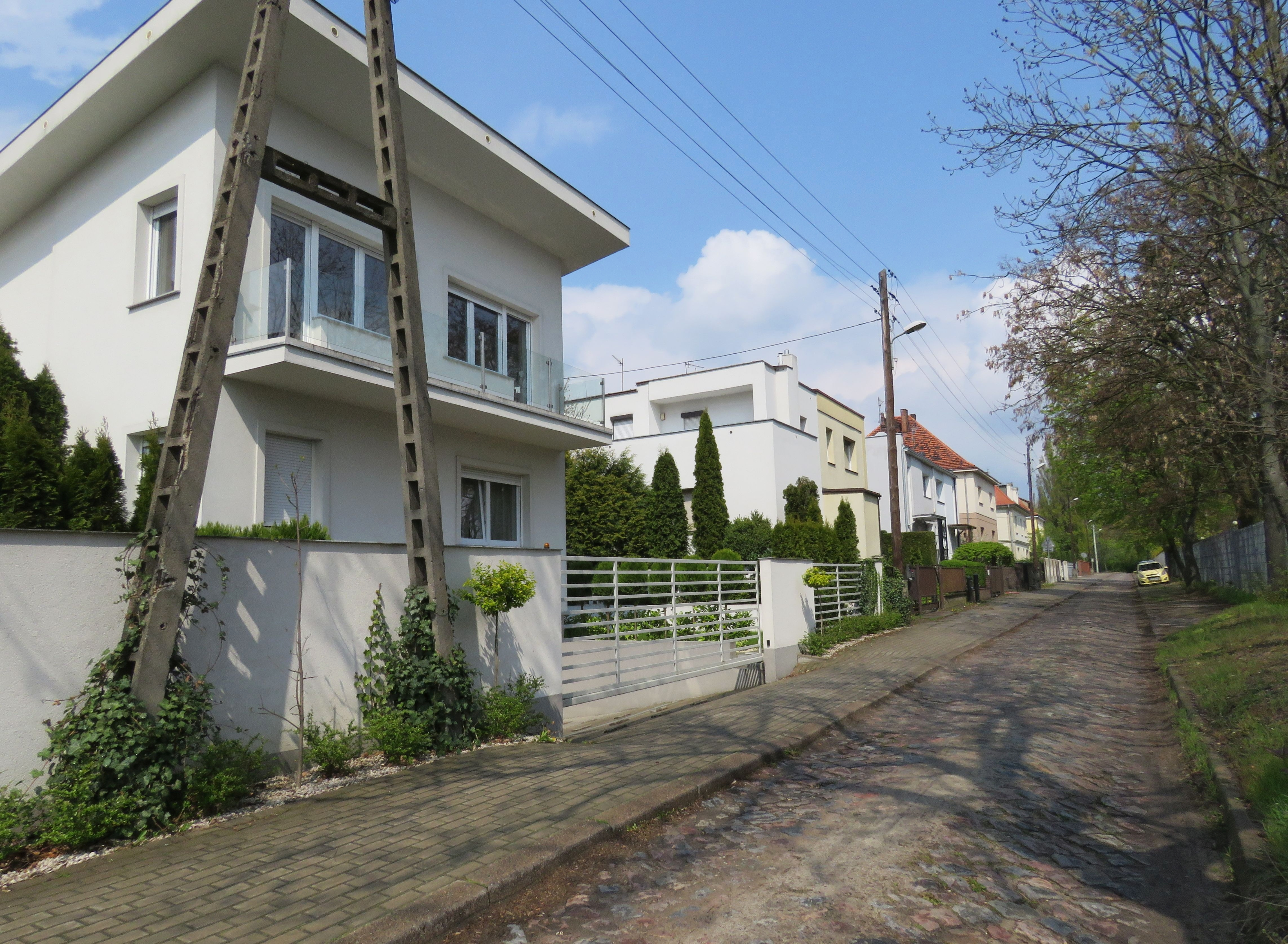 Poznań, ul.Obozowa